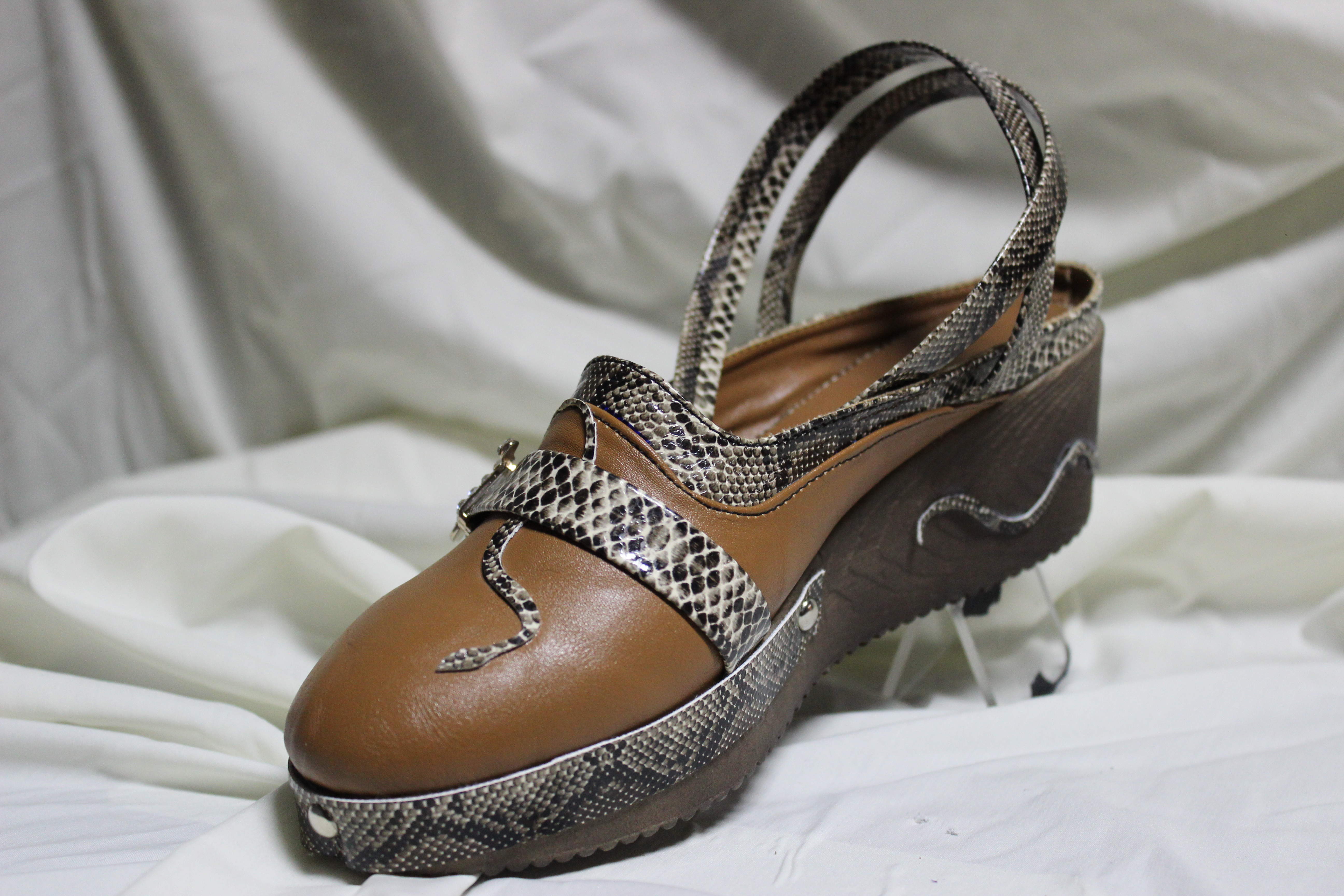 Sabot avec motif serpent